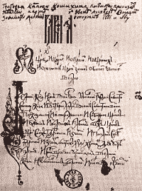 Сочинение о Московском государстве в середине xvii столетия Григория Котошихина Автограф Скоропись xvii века